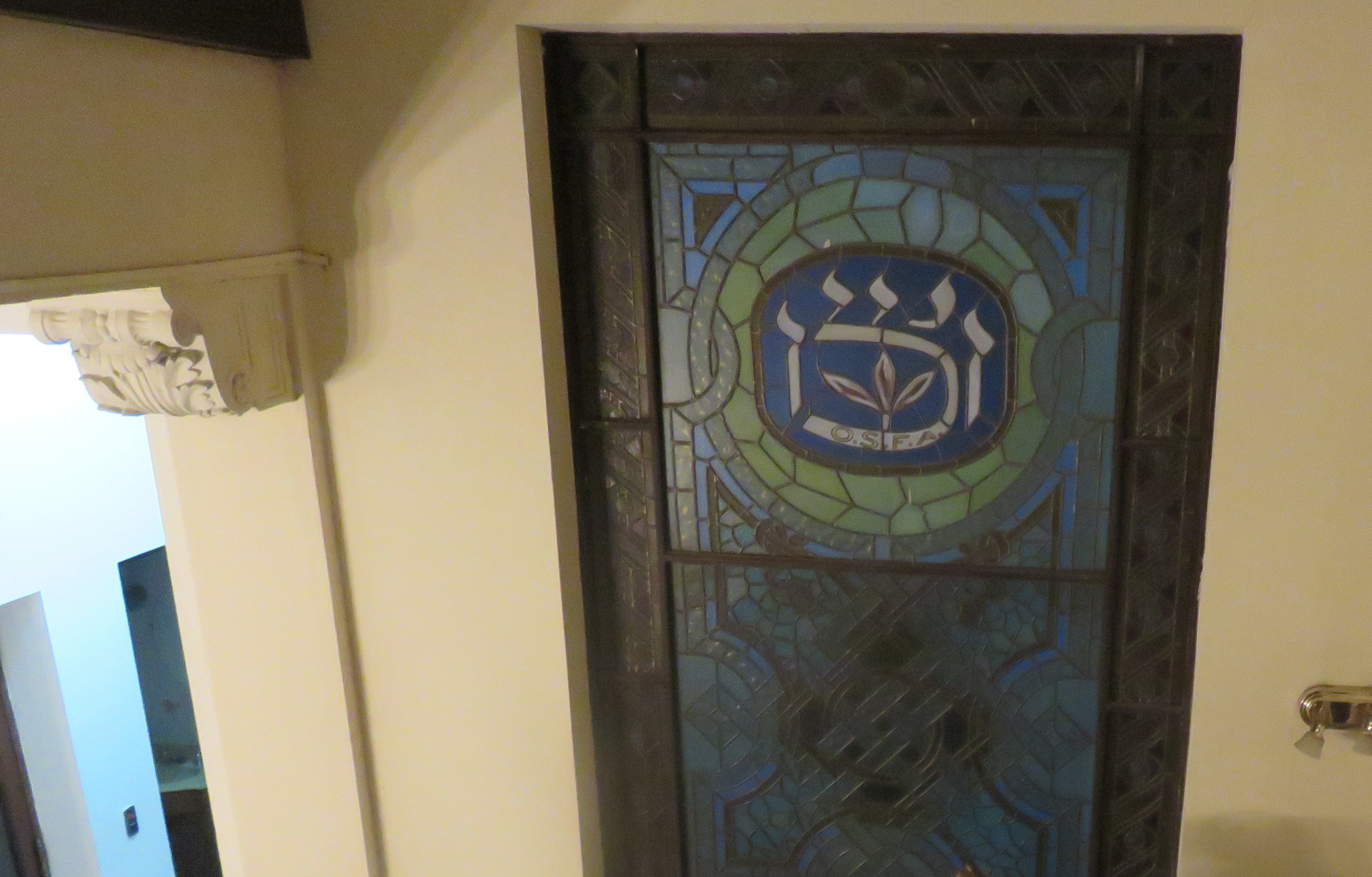 חלון מעוצב עם סמל ויצו הממוקם בגרם המדרגות הפנימי שבבניין ויצו ארגנטינה אשר בבואנוס איירס